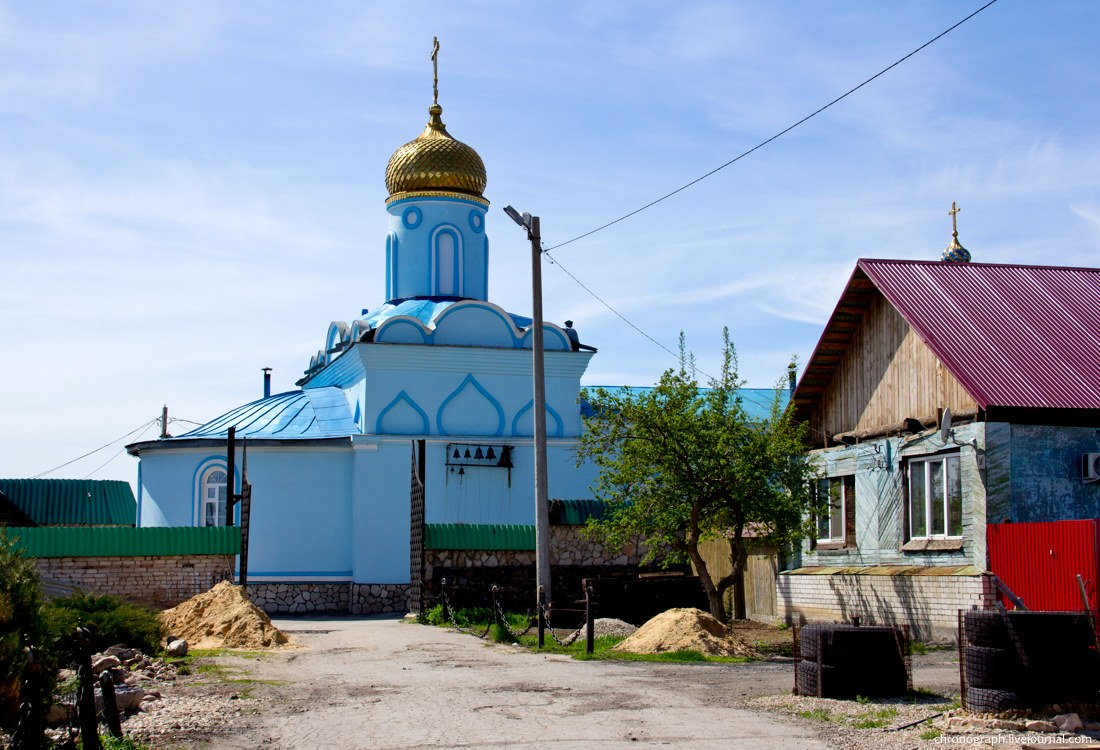 Церковь в честь Смоленской иконы Божьей Матери. Октябрьск